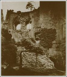 zamek - Archer Licensing obrázek z